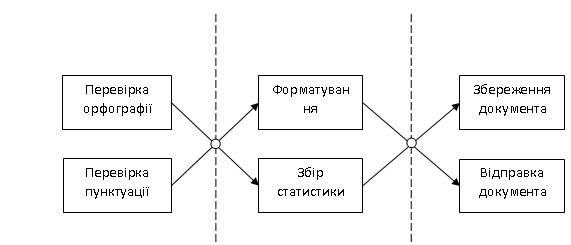 Розбиття функціональної дикомпозиції